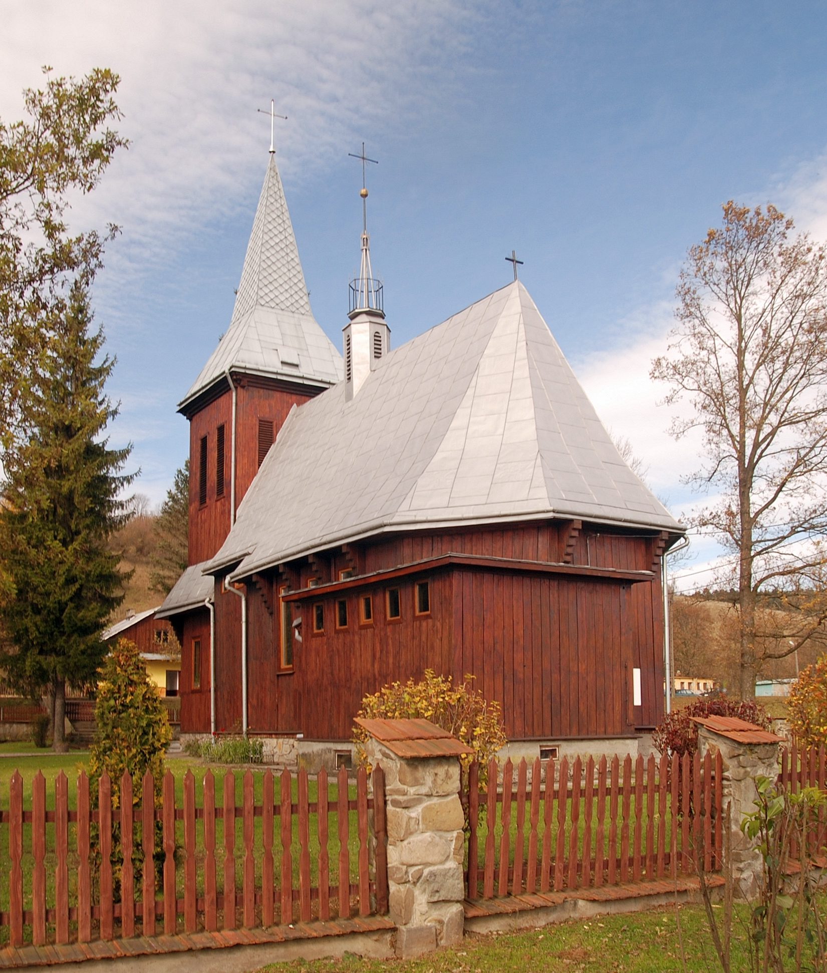 Saint Joseph church in Komańcza